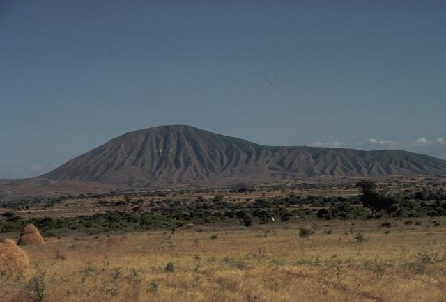 Bora-Bericcio volcanic complex.